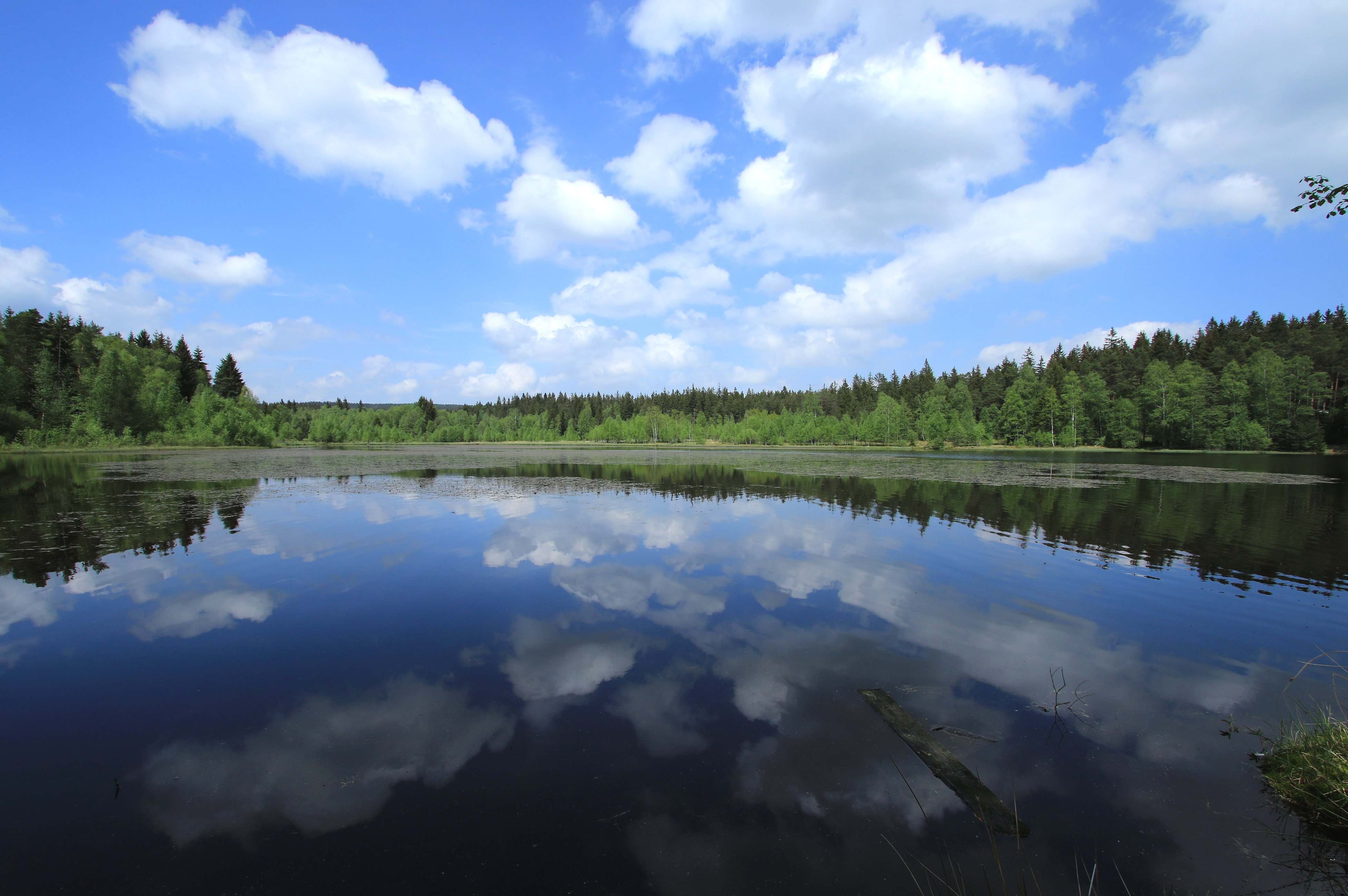 Schwarzer Teich; Naturschutzgebiet "Hermannsdorfer Wiesen" in Sachsen. Befindet sich auf der rechten Seite Staatsstraße 222 zwischen Geyer und Elterlein.